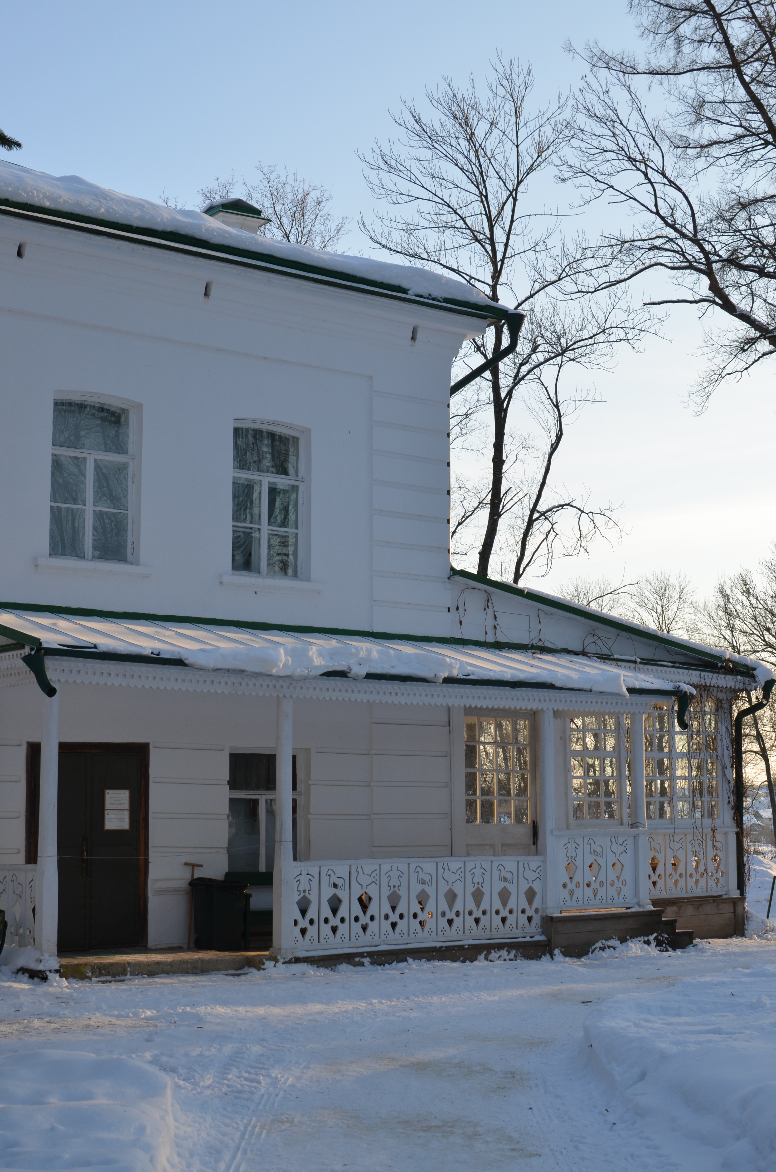 Фотография Ясной Поляны - усадьбы в Тульской области.